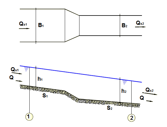 Ilustración para explicar la erosión por estrechamiento de u cauce